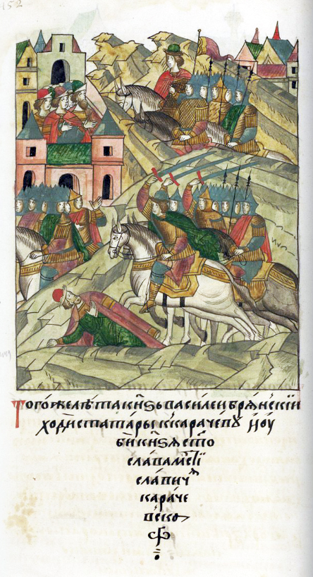 ЛИЦЕВОЙ ЛЕТОПИСНЫЙ СВОД В том же году князь Василий Брянский ходил с татарами к Карачеву и убил князя Святослава Мстиславича Карачевского.